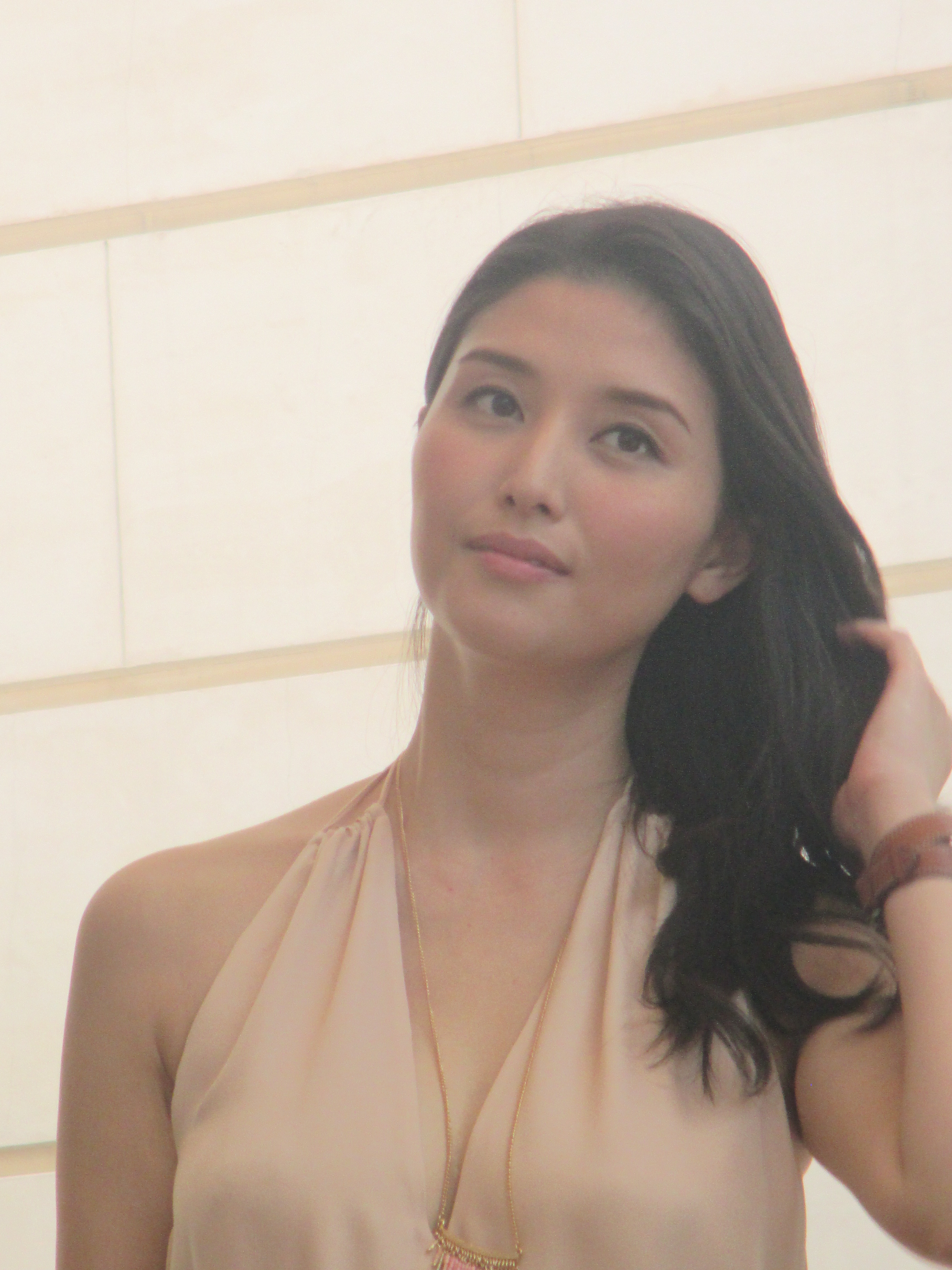 表参道20160426